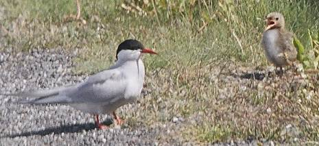 Sterna paradisaea (Sterna codalunga) con pulcino. Foto scattata fine di giugno 2004 a Höfn in Islanda merdionale